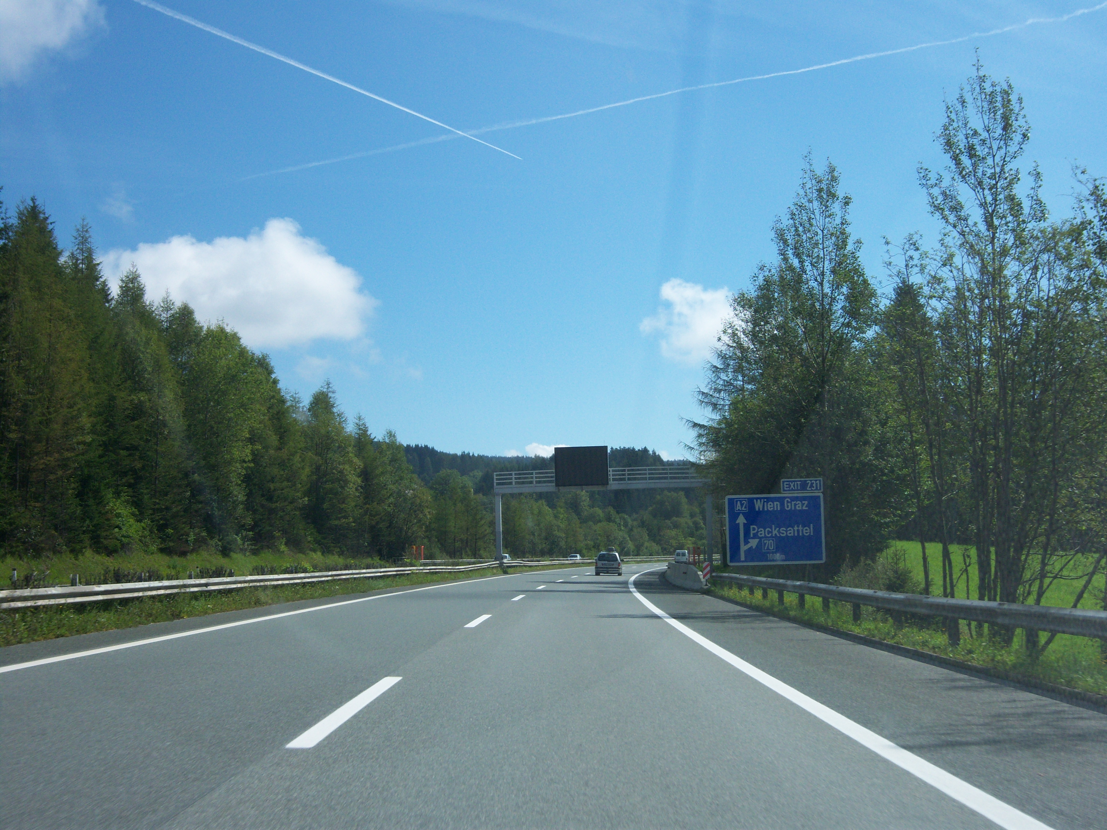 Süd Autobahn A2 Richtung Wien im Bereich der Anschlussstelle Packsattel